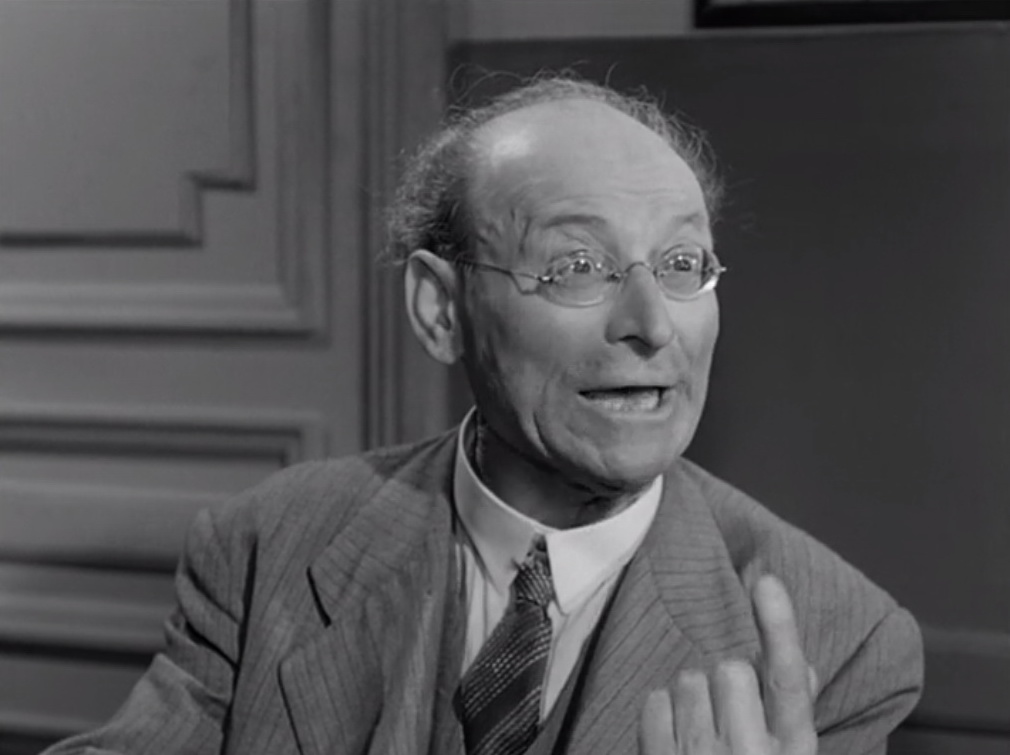 Screenshot dal film Accadde al commissariato (1954)